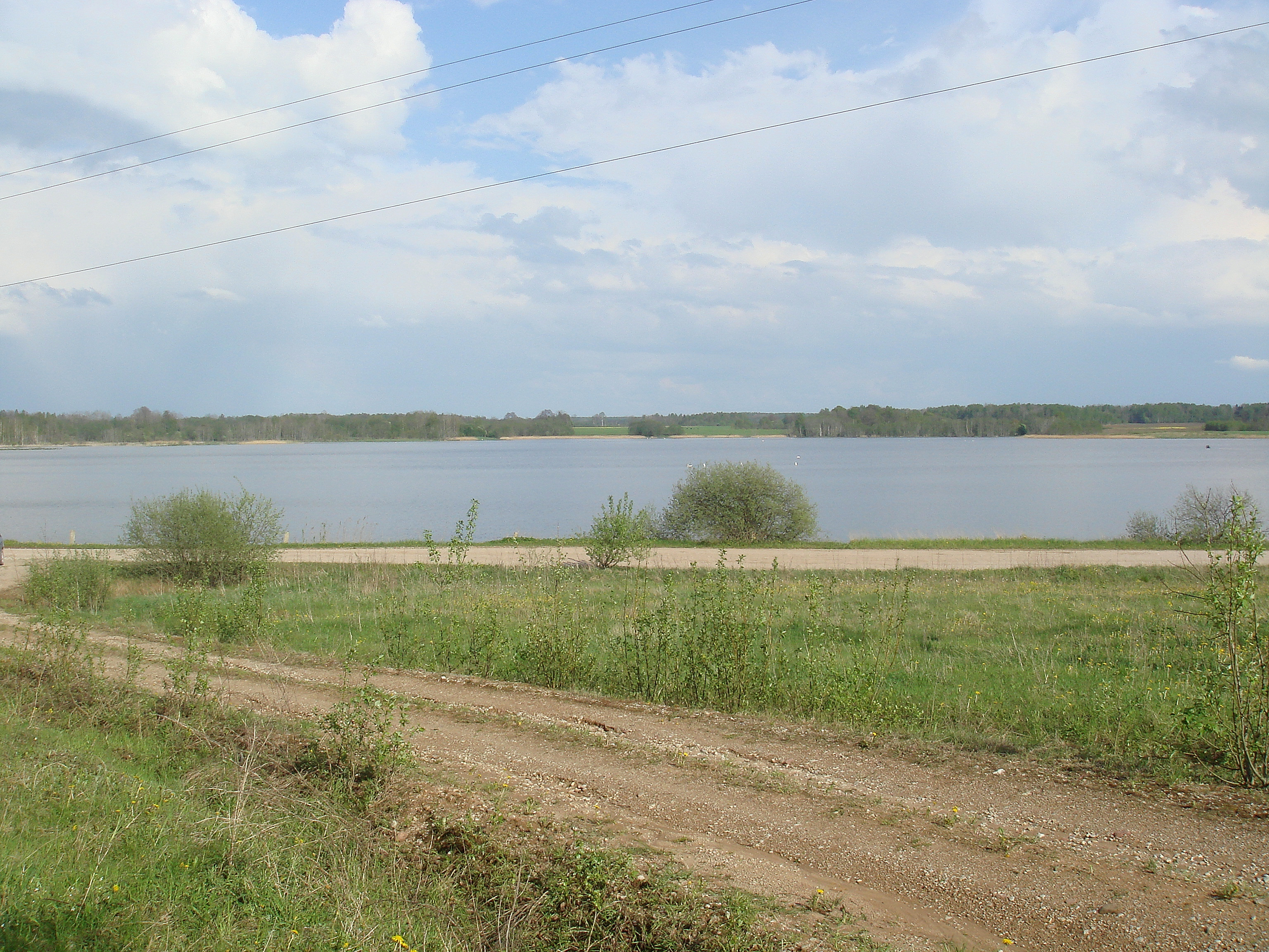 Prūšu ūdenskrātuve (reservoir in Liepaja district, Latvia)